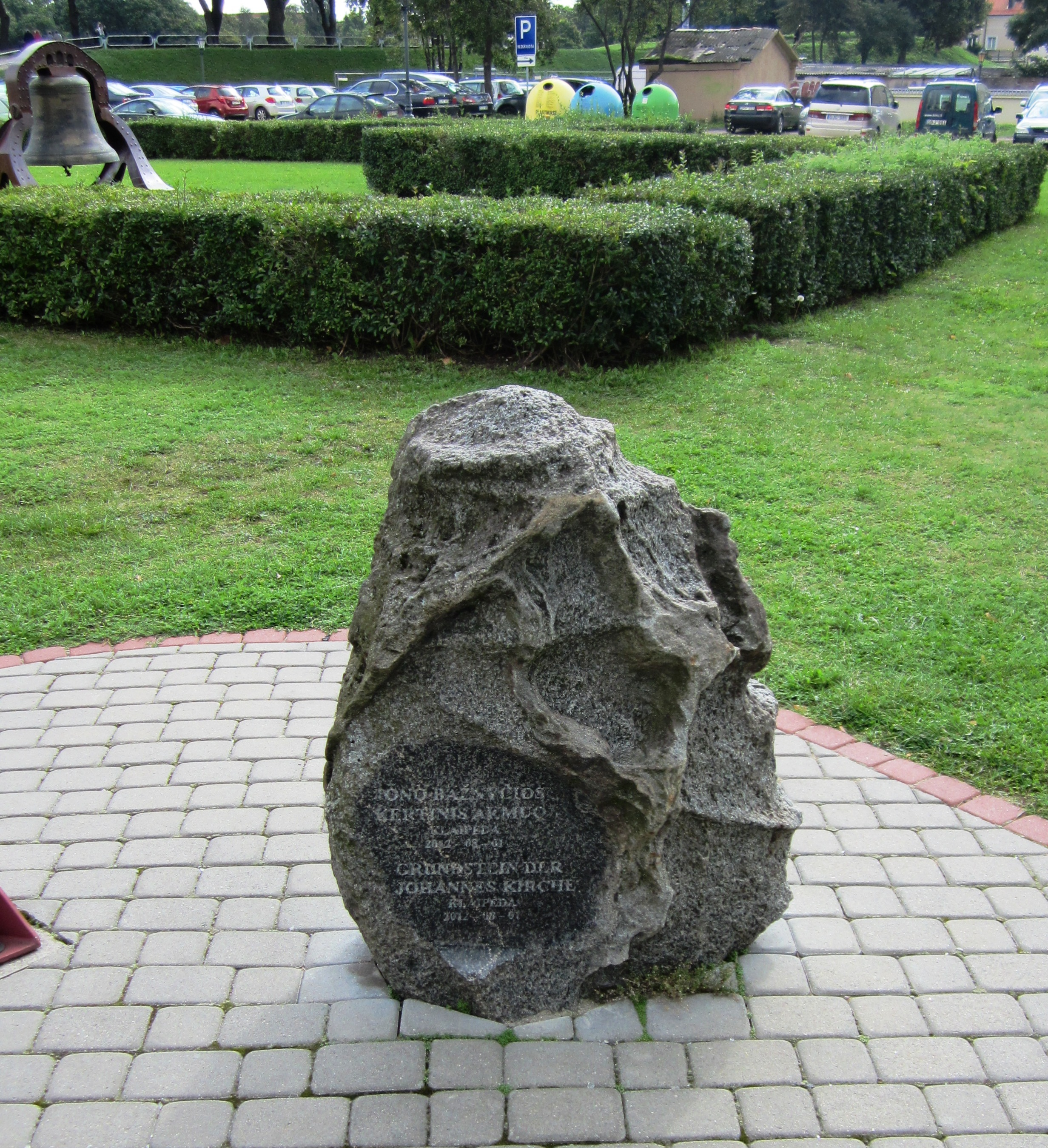 Grundstein der Johanneskirche von Memel, im Hintergrund die Grundrisshecke und hinten links die Glocke